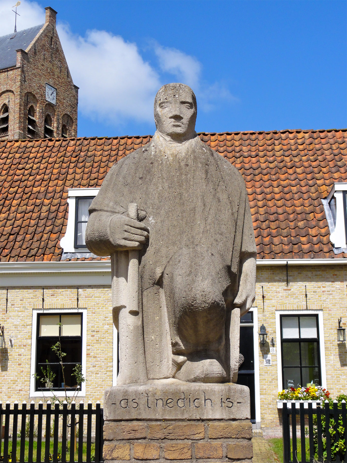 As it nedich is door Jan van Luijn oorlogsmonument Ferwerd